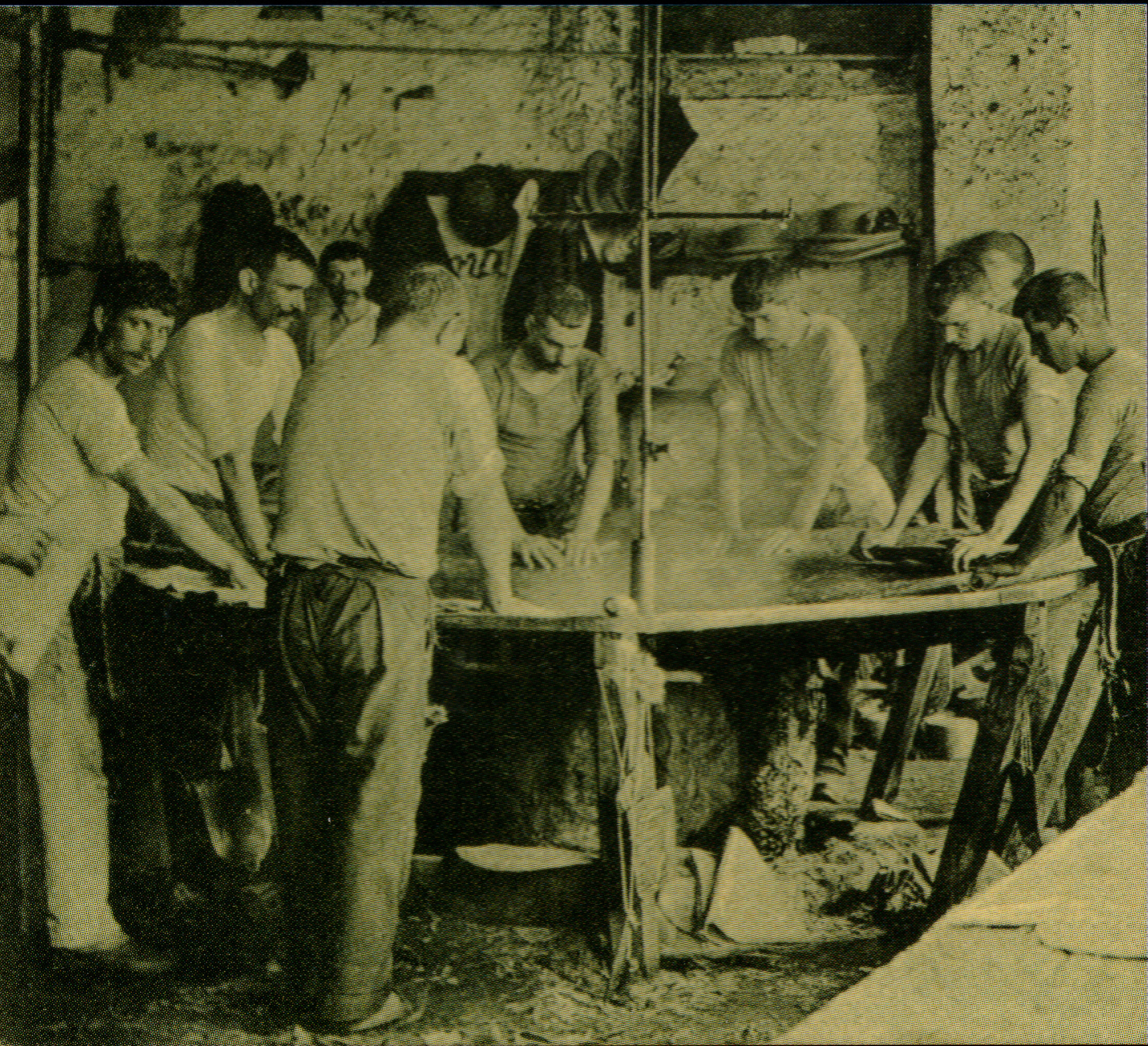 Operários chapeleiros em volta de uma "Fula", caldeira onde emanavam vapores ácidos e corantes utilizados para preparar e tingir os feltros finos. Em consequência de manusearem os feltros sem qualquer protecção, as unhas dos operários deterioravam-se tomando a tonalidade negra, pelo que eram conhecidos como "Unhas Negras". Este trabalho árduo está imortalizado na obra "Unhas Negras" de João da Silva Correia.